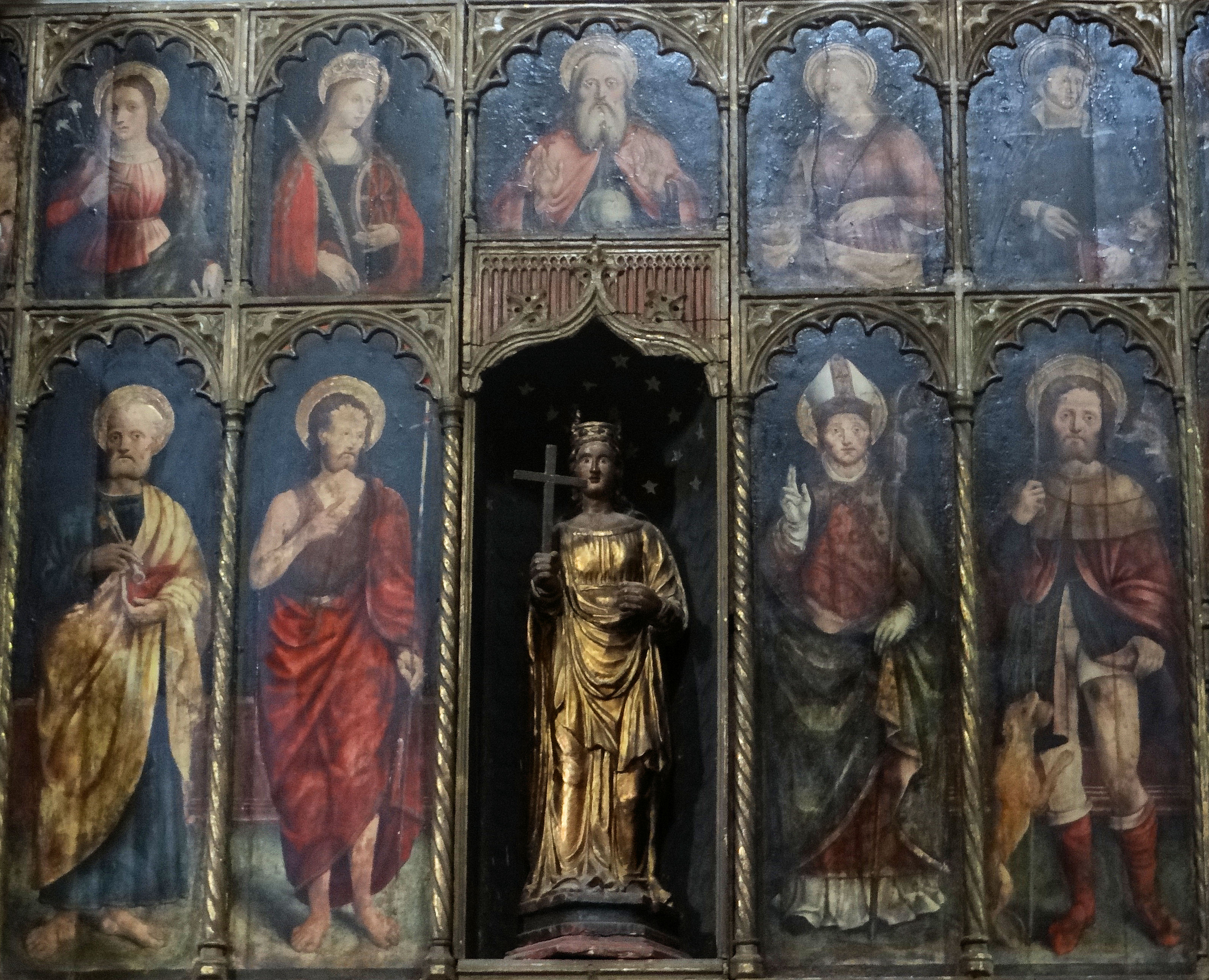 Contes (Alpes-Maritimes, France), église Sainte-Marie-Madeleine, retable de sainte Marie Madeleine -2.